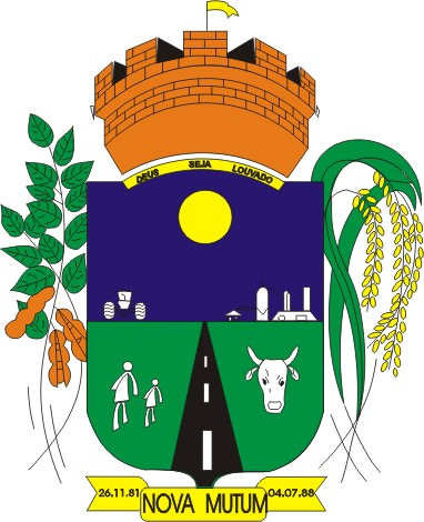 Brasão de Nova Mutum - MT